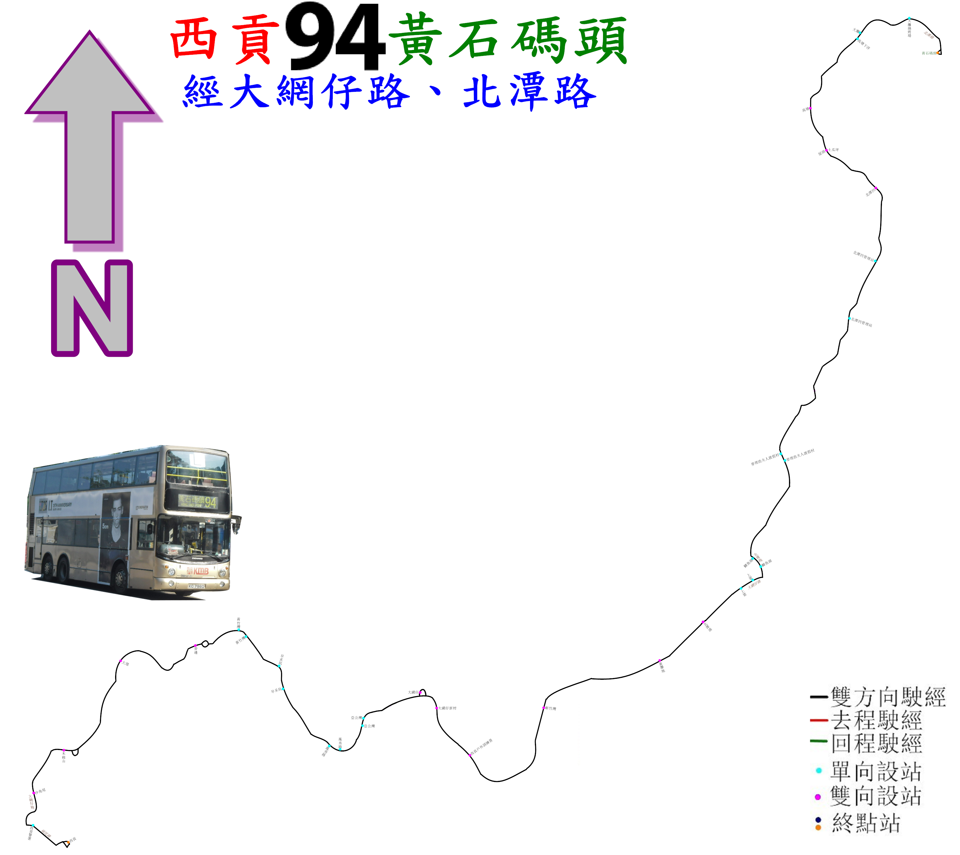 中文（香港）: 九巴94號線的走線圖